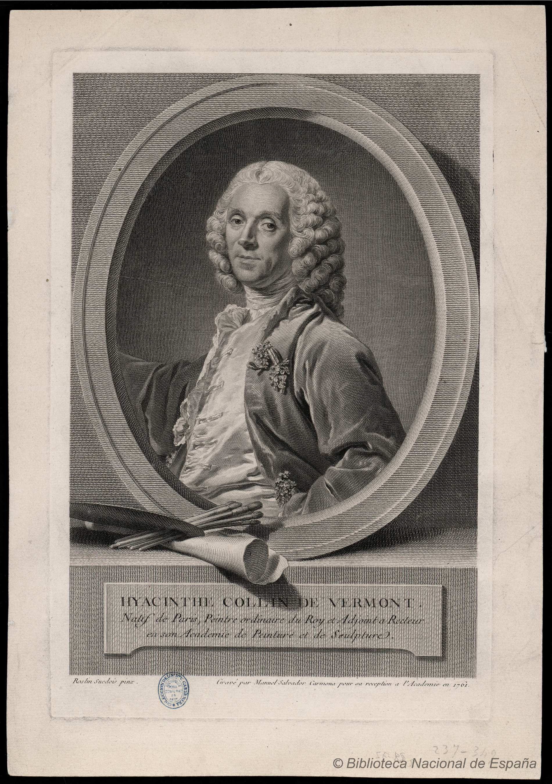 Retrato de Hyacinthe Collin de Vermont firmado Roslin suedois pinx. Gravé par Manuel Salvador Carmona pour sa reception a l'Academie en 1761. Inscripción: Natif de Paris, Peintre ordinaire du Roy et Adjoint a Recteur / en son Academie de Peinture et de Sculpture